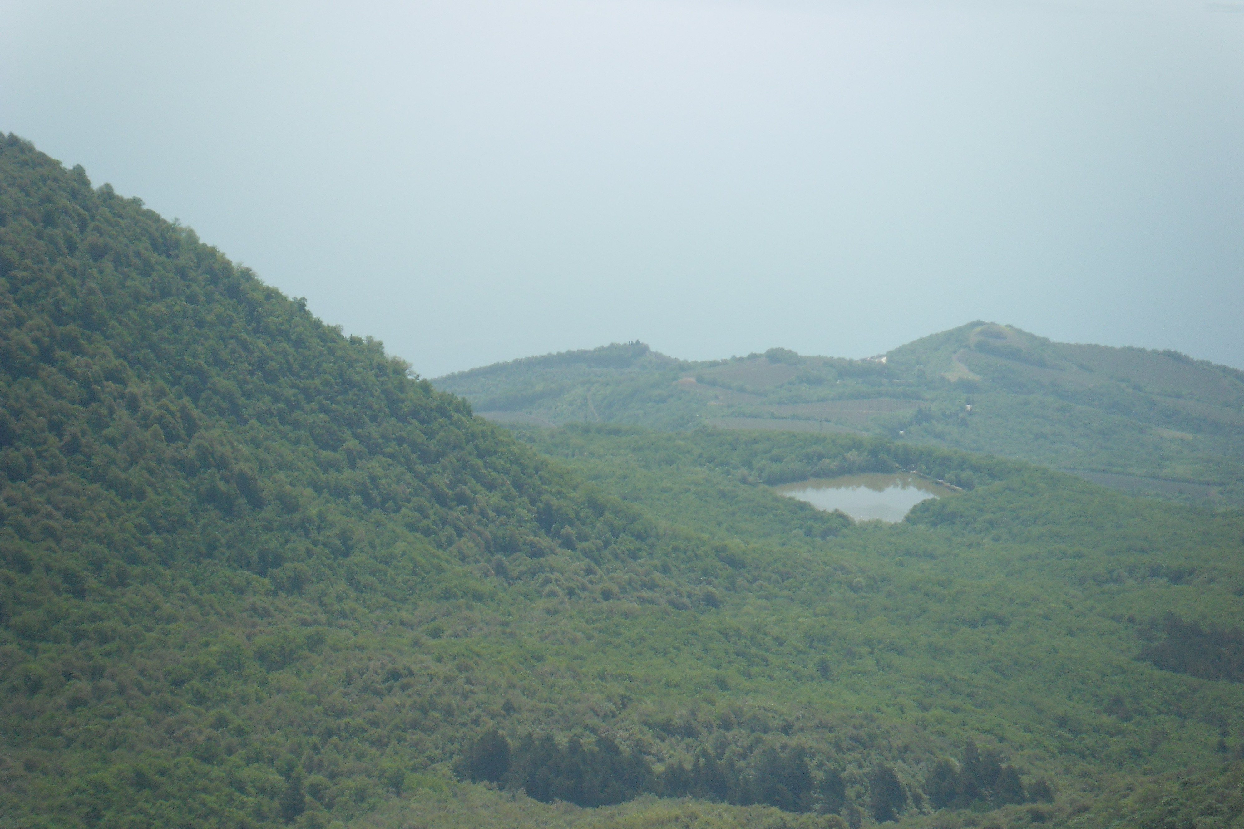 Фото